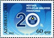 Müstəqil Dövlətlər Birliyinin yaradılasının 20 illiyinə həsr edilmiş marka.